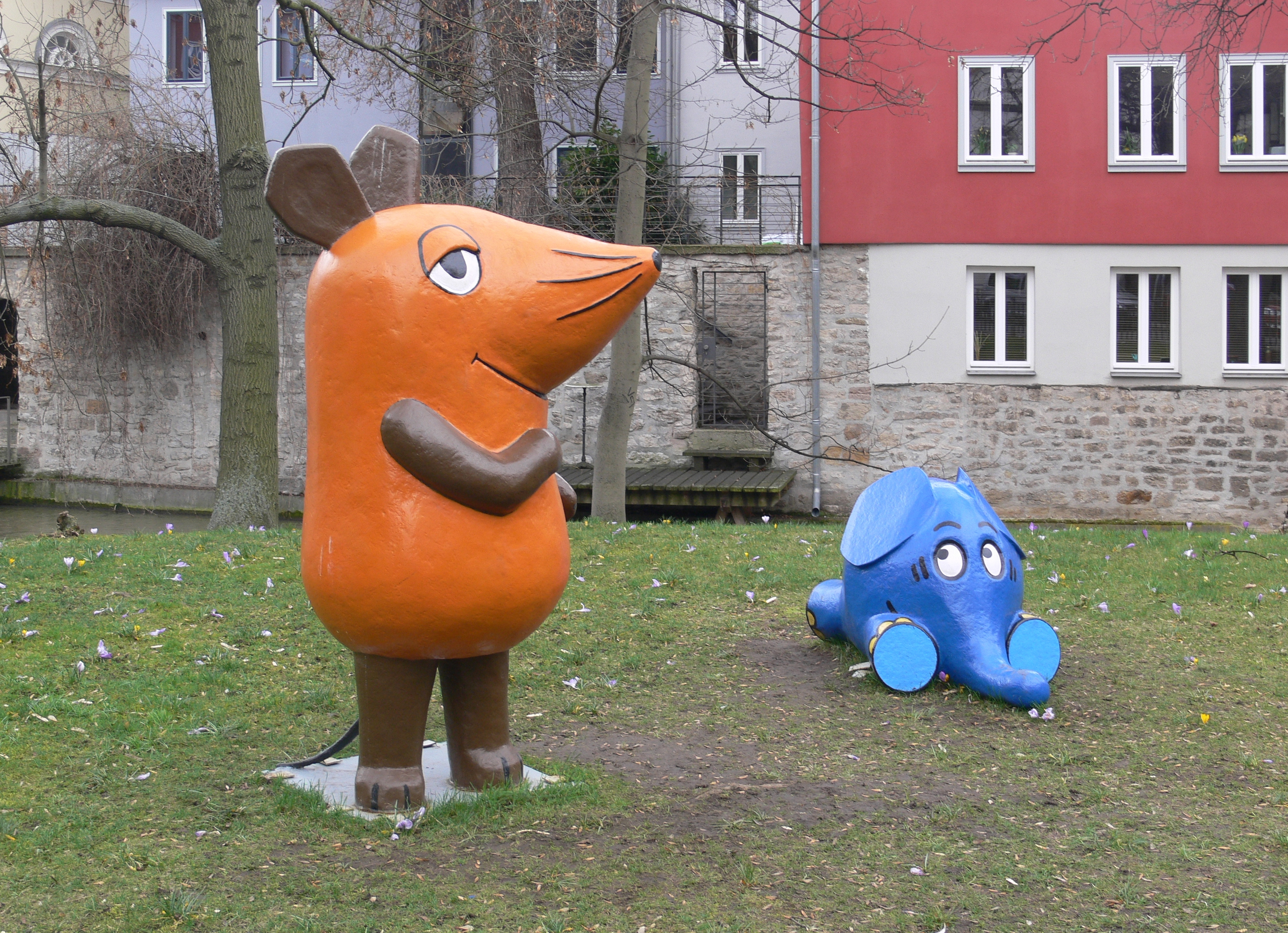 Figuren "Maus" und "Elefant" aus der WDR-Sendung "Die Sendung mit der Maus", erstmalig aufgestellt an der Rathausbrücke in Erfurt. Neuer Standort ist der Anger (vor Hauptpostamt).